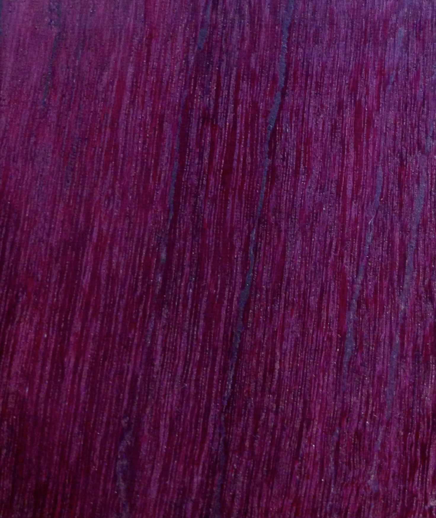 Amaranth 1